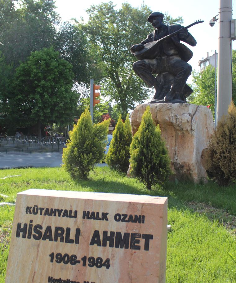 Hisarlı Ahmet heykeli